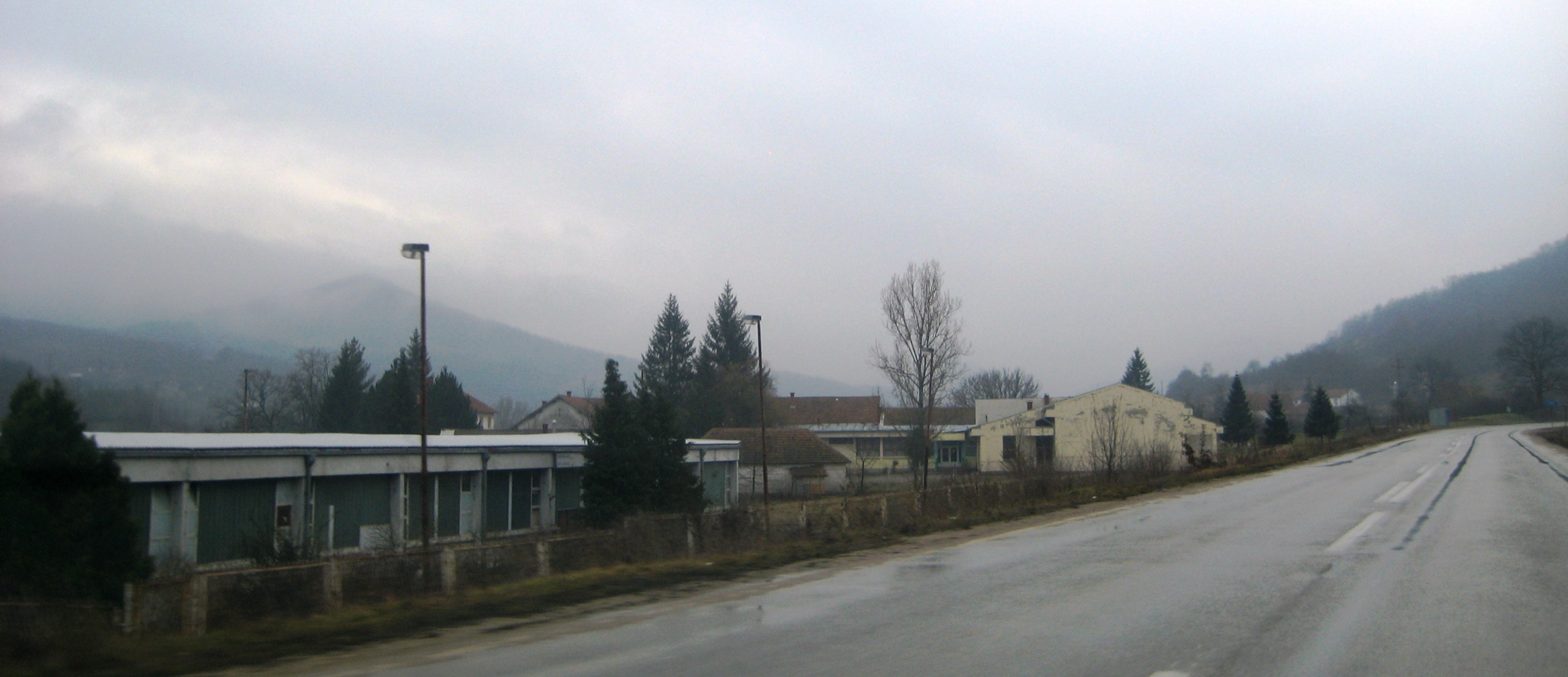 Косаничка Рача, Куршумлија